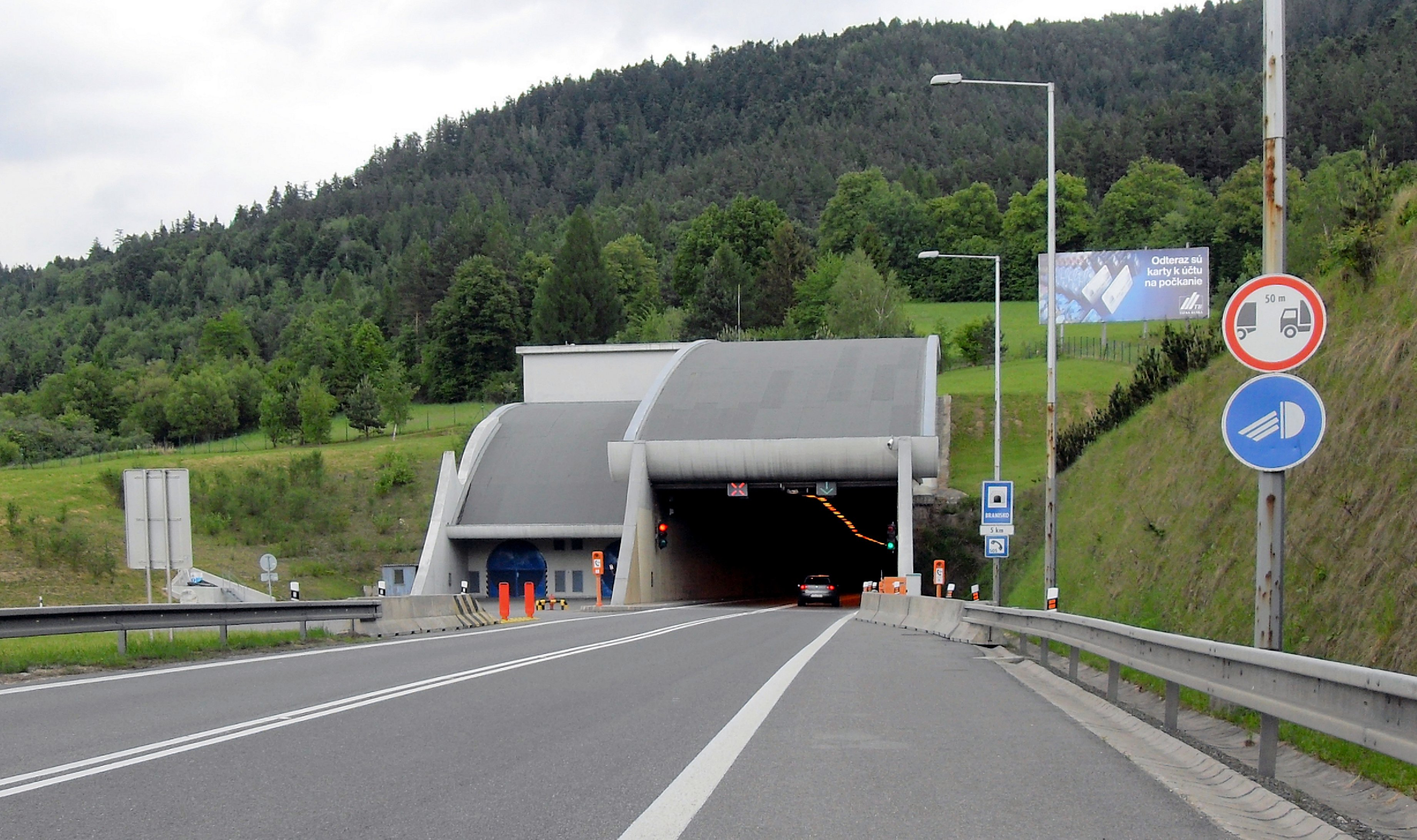 Západné vchod do tunela Branisko